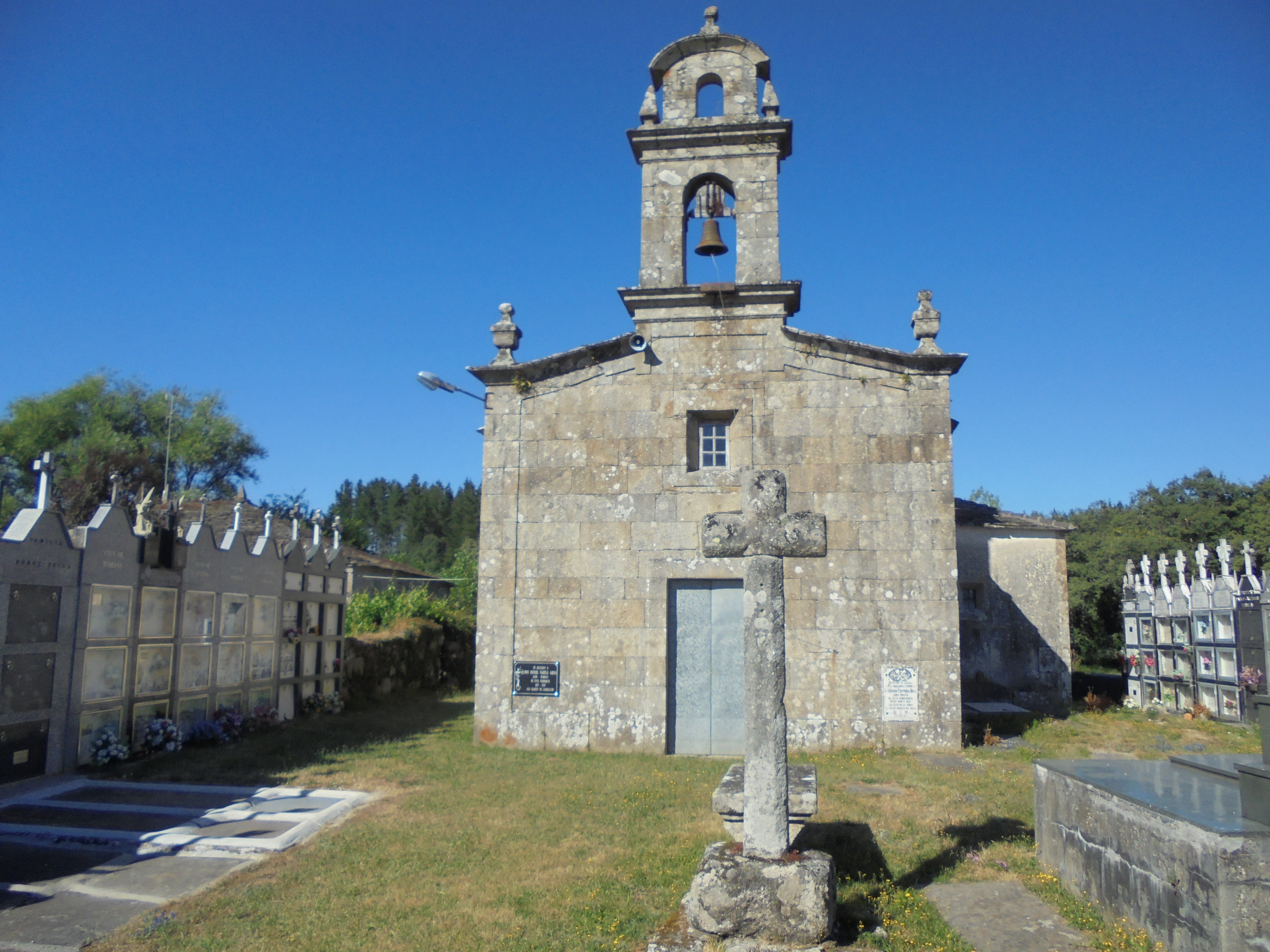 Igrexa parroquial de Carballido ( Lugo)